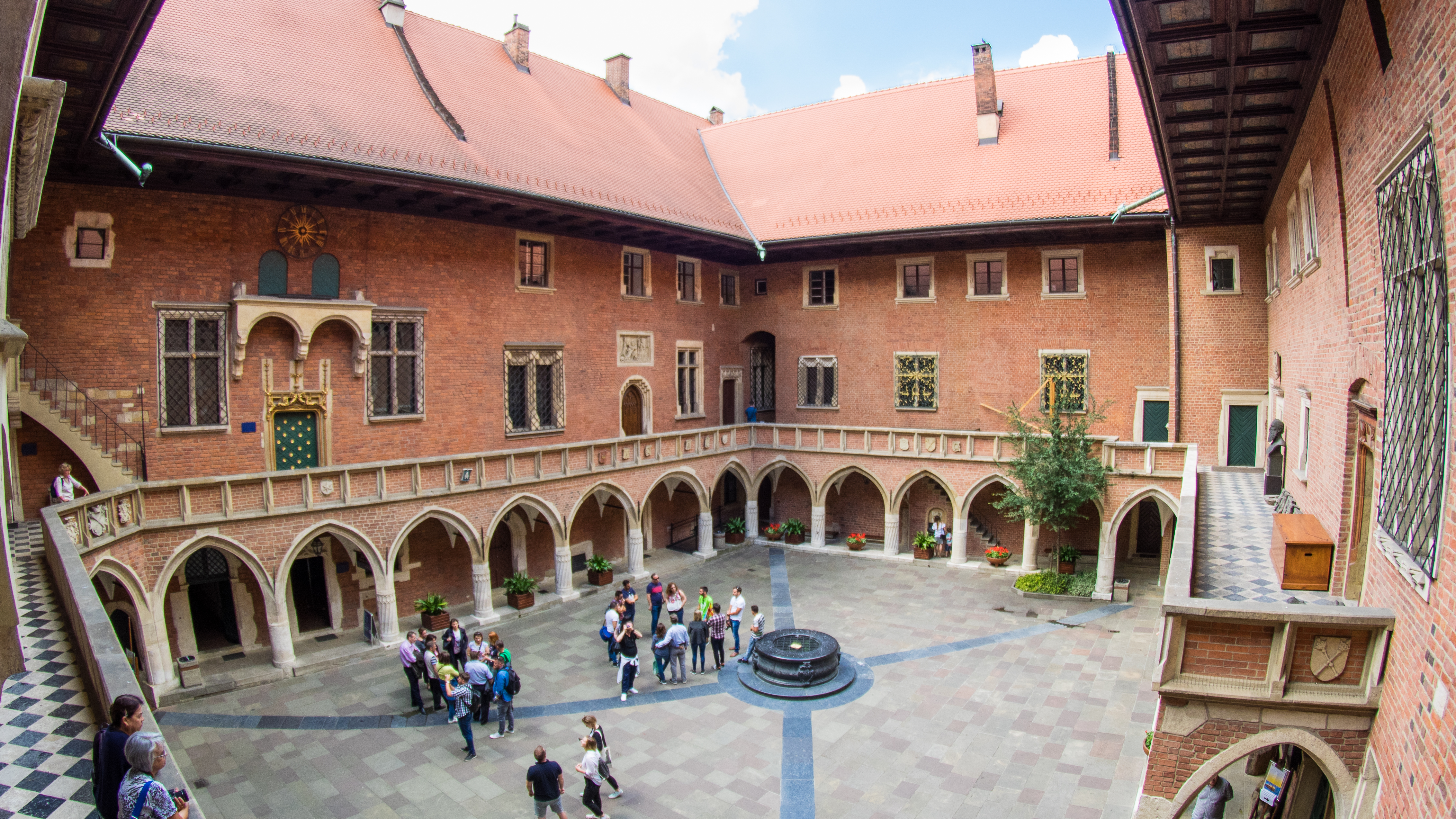 Kraków, Collegium Maius Uniwersytetu Jagiellońskiego Wikidata has entry Q919596 with data related to this item.